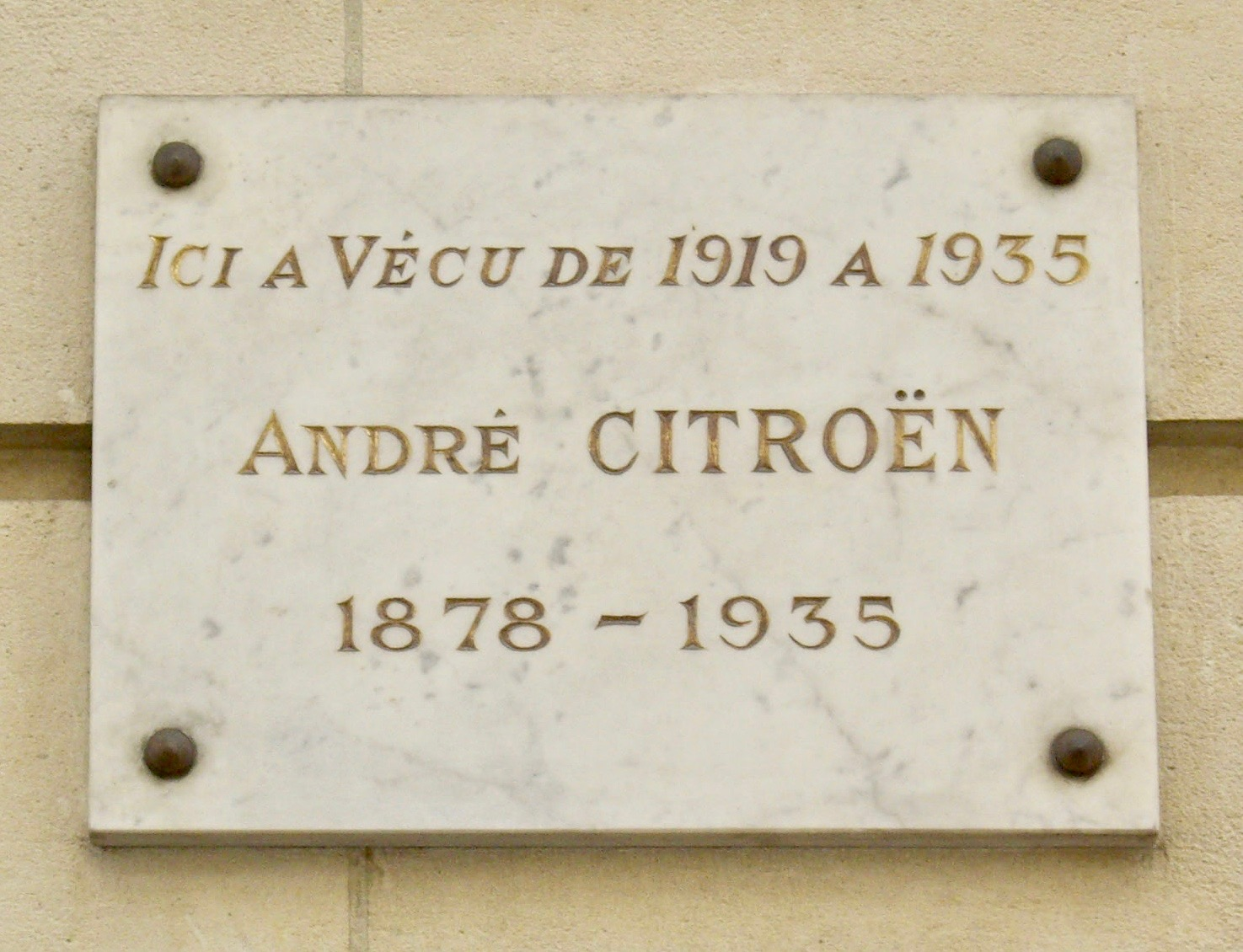 Plaque commémorative, 31 rue Octave-Feuillet, Paris 16e. « Ici a vécu, de 1919 à 1935, André Citroën, 1878-1935. »